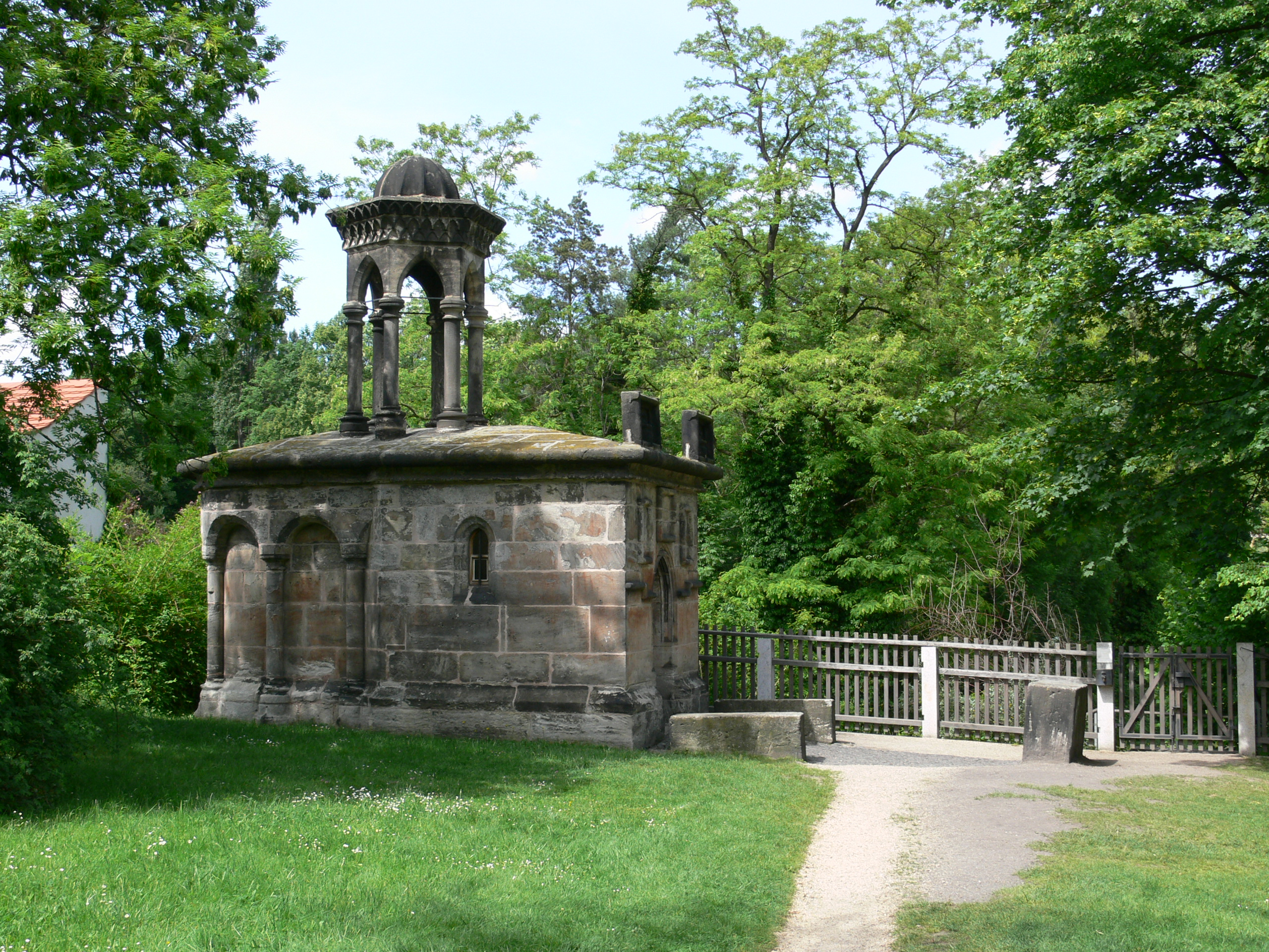 Grabkapelle, Heiliges Grab, Görlitz